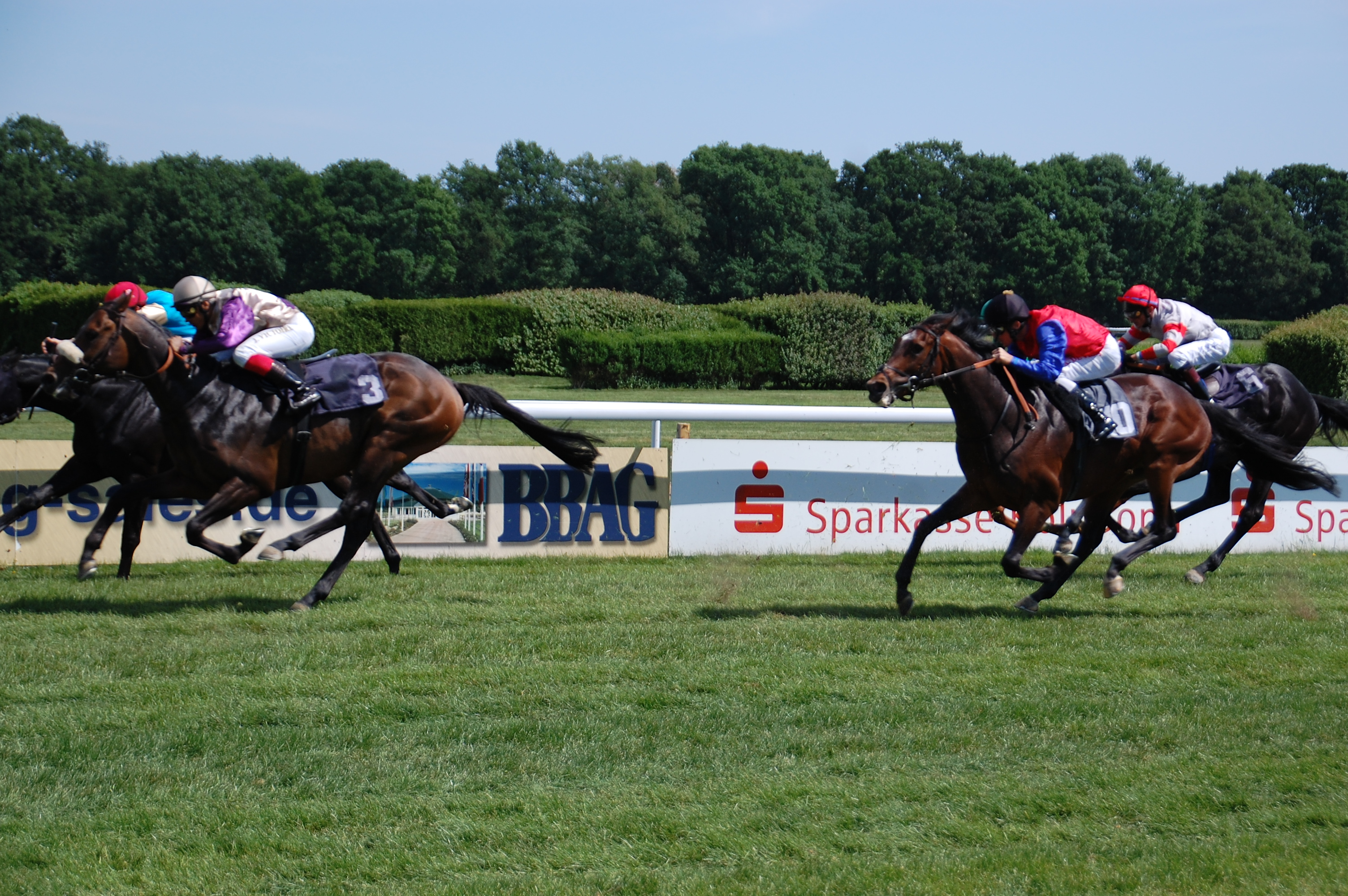 Horse racing at Galopprennbahn Weidenpesch, Germany; 76. 08.05.2011, Königstreuer -Rennen